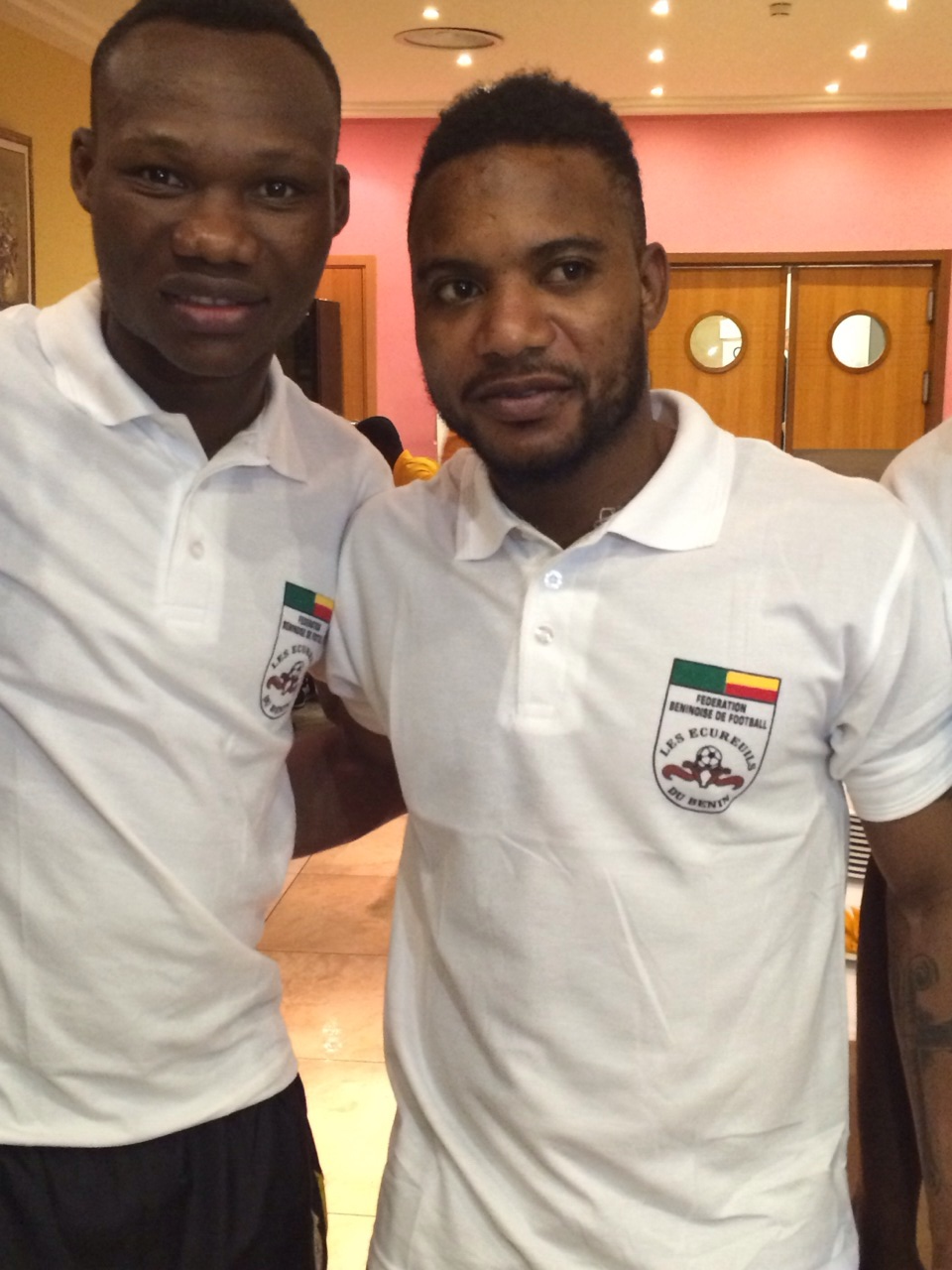 Désiré Sègbè Azankpo est né le 6 Mai 1993 au Bénin. Du haut de ses 21 ans, il est international béninois depuis le 17 Mai 2014. Ses prouesses techniques, ses conduites de balle, sa puissant athlétique, sa lourde frappe, sa pointe de vitesse phénoménale et ses passements de jambes hors pairs ont poussés le nouveau sélectionneur des Ecureuils du Bénin, Ollé-Nicole, a lui confié la pointe de l’attaque de l’équipe nationale du Bénin aux côtés de Stéphane Sessegnon et Razack Omotoyossi. Parcours Professionnel : 2013-2014: Fc Metz contrat pro et jeunesse d'esch (du 31 Janvier au 31 Mai) 2012-2013: Fc Metz contrat stagiaire. 2011-2012: Fc Metz contrat stagiaire. 2010-2011: Génération Foot de Dakar (ligue 2 professionnelle) 2009-2010: Génération Foot de Dakar (Champion de National 1) 2008-2009: Bénin Foot Académie.